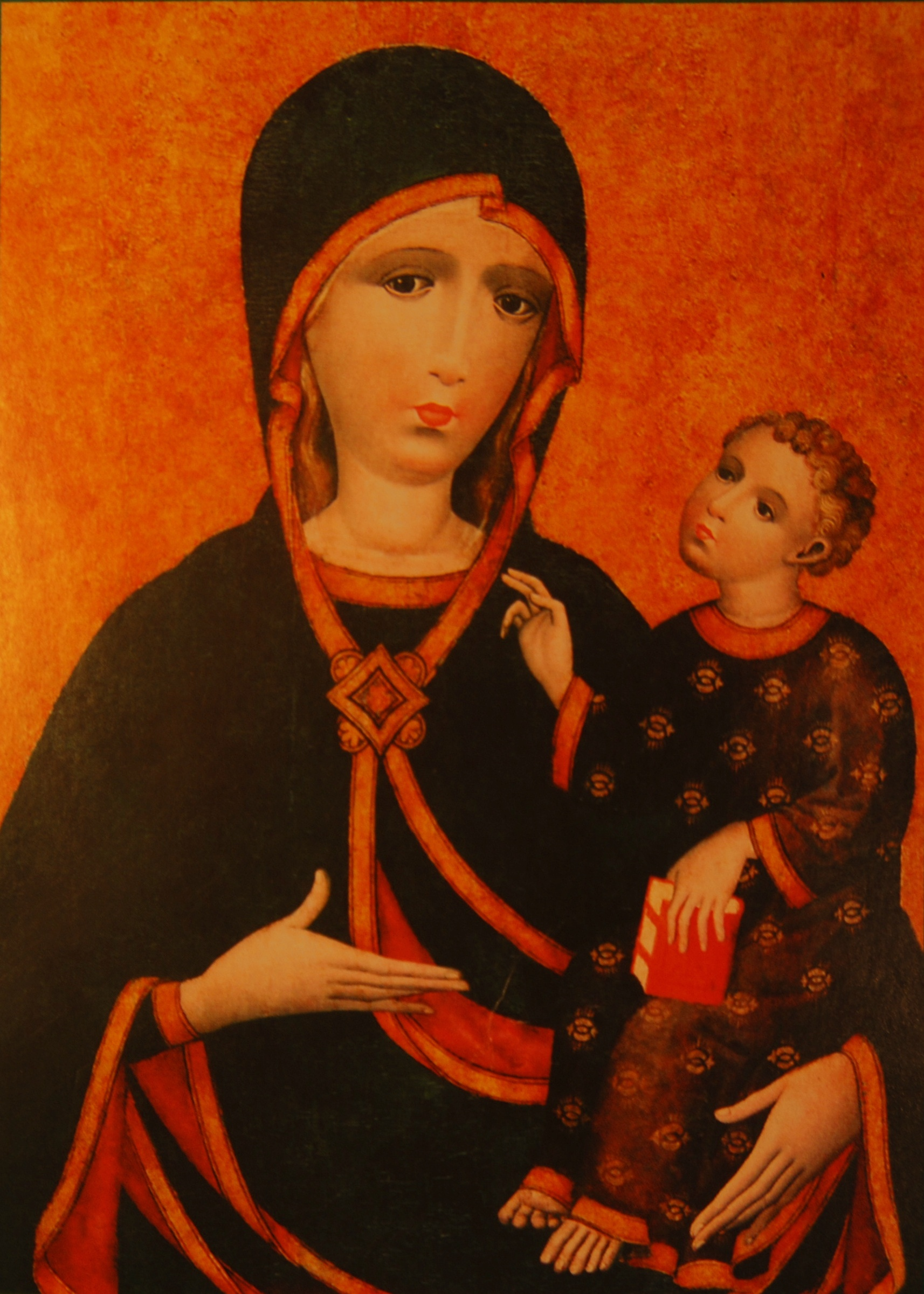 kosciół